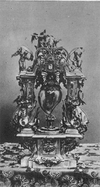 Reliquia del corazón de Santa Teresa de Jesús en las Carmelitas - Alba de Tormes (Salamanca) - España Turística y Monumental / Cuarto álbum / Las Bellezas de Castilla / Región Leonesa - Cromo 90 x 120 Sepia